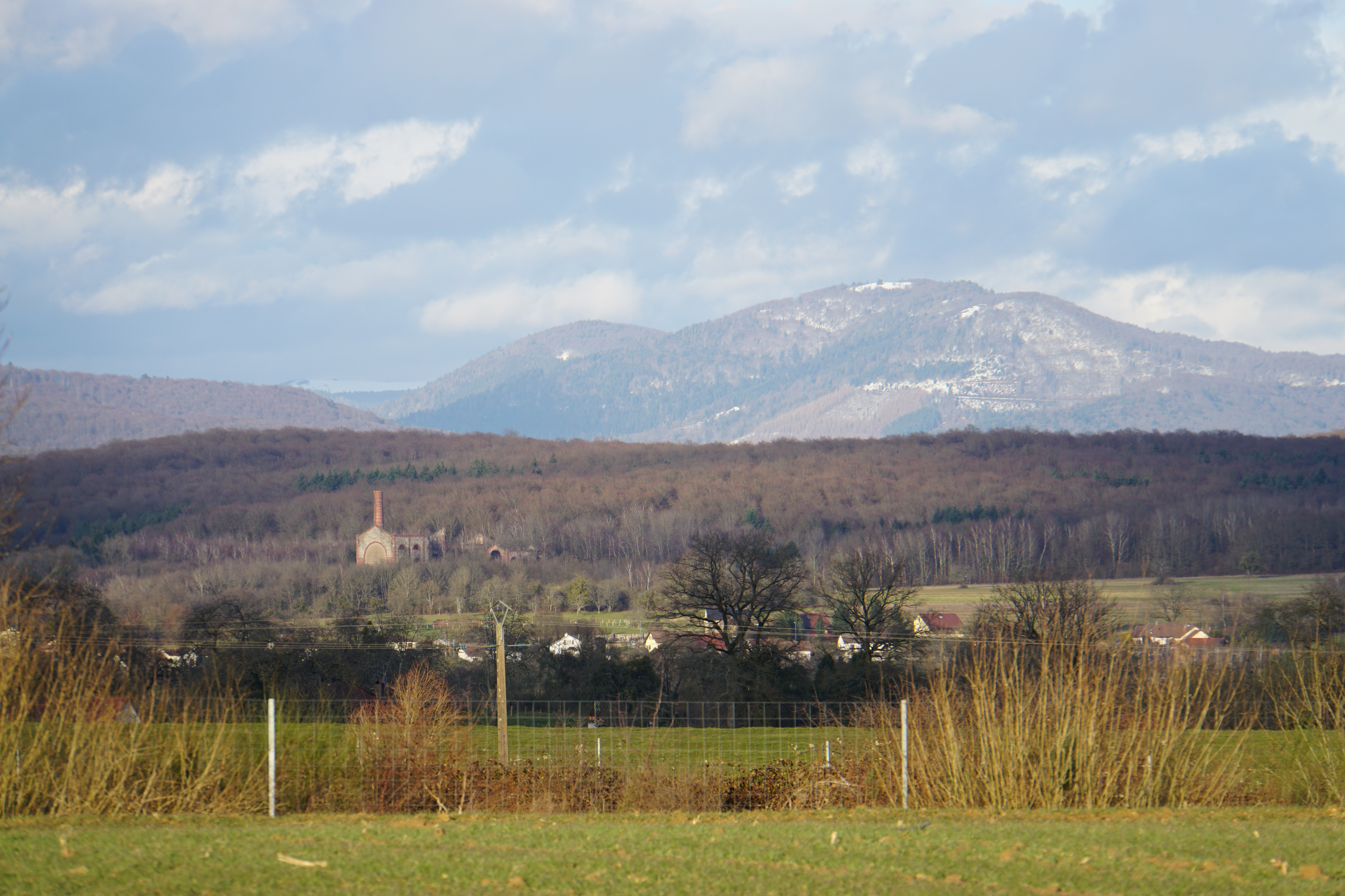 Le puits Distant view of puits Arthur de Buyer vue depuis Lyoffans.